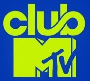 Logo von Club MTV seit 01.06.2020